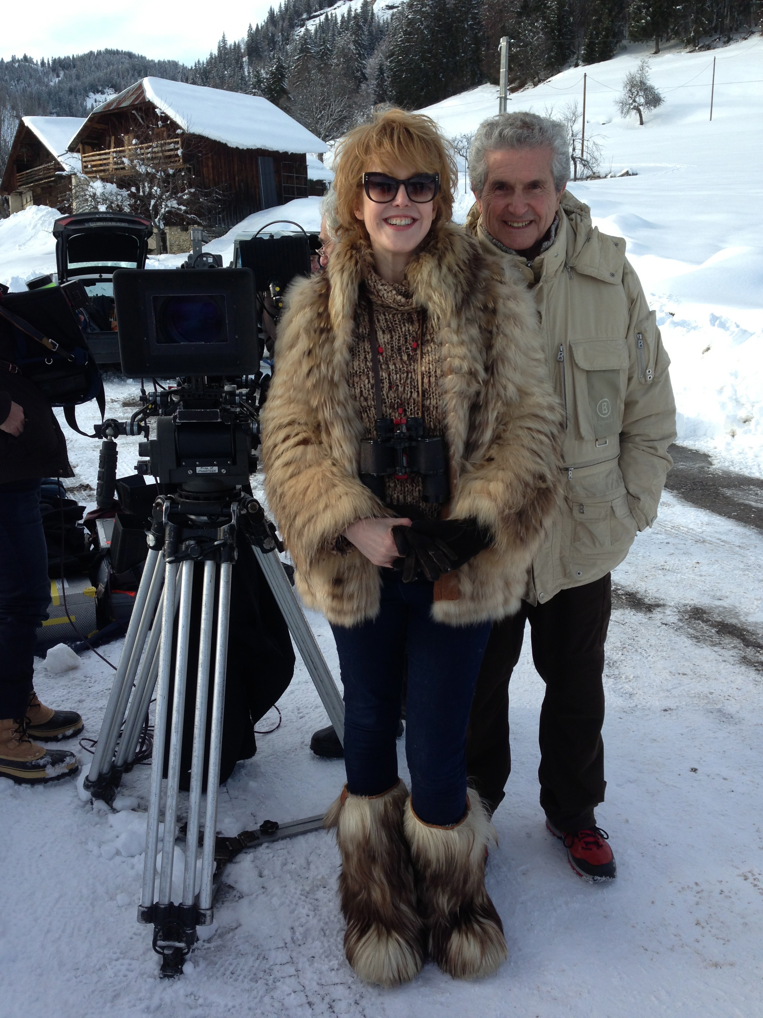 Agnès Soral sur le plateau du tournage de Salaud, on t'aime de Claude Lelouch, sortie 3 avril 2014